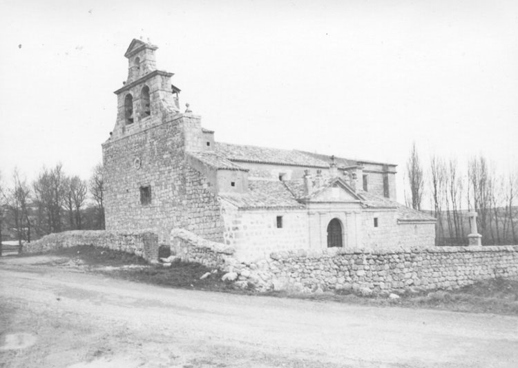 Iglesia de San Pelayo - Barruelo del Valle (Valladolid) - Álbum 200 x 140 - Fotografía. Papel 115 x 90 B/N